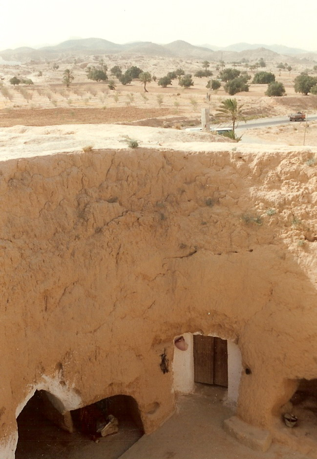 Paroi d'une maison troglodyte de Matmata (Tunisie)